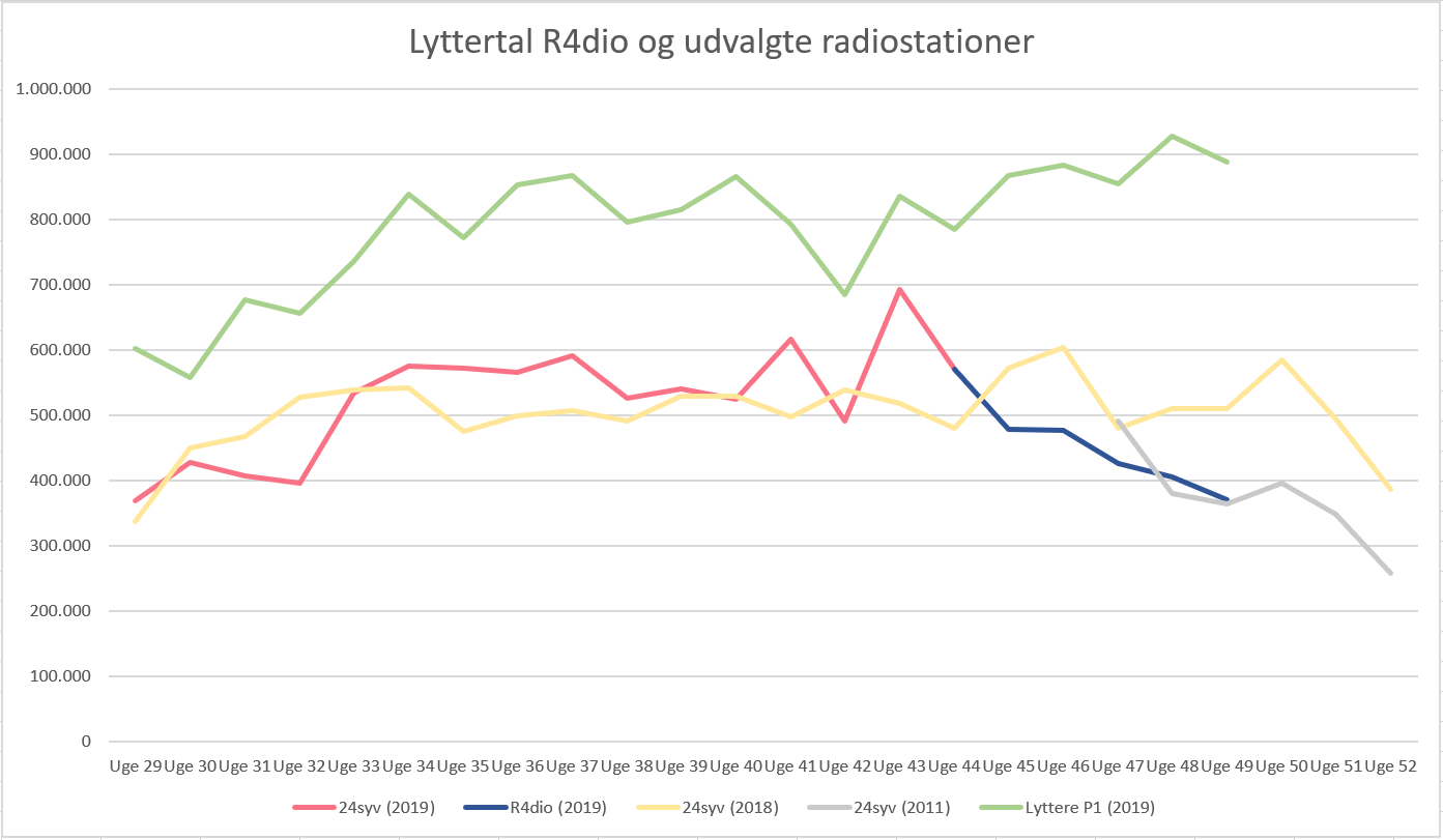 Graf over udviklingen for lyttertallene på R4dio henholdsvis Radio24syv i 2011, 2018 og 2019 samt DR P1 i 2019. Alle tal baserer sig på Kantar Gallups Radio-meter analyse, der udkommer ugentligt. (